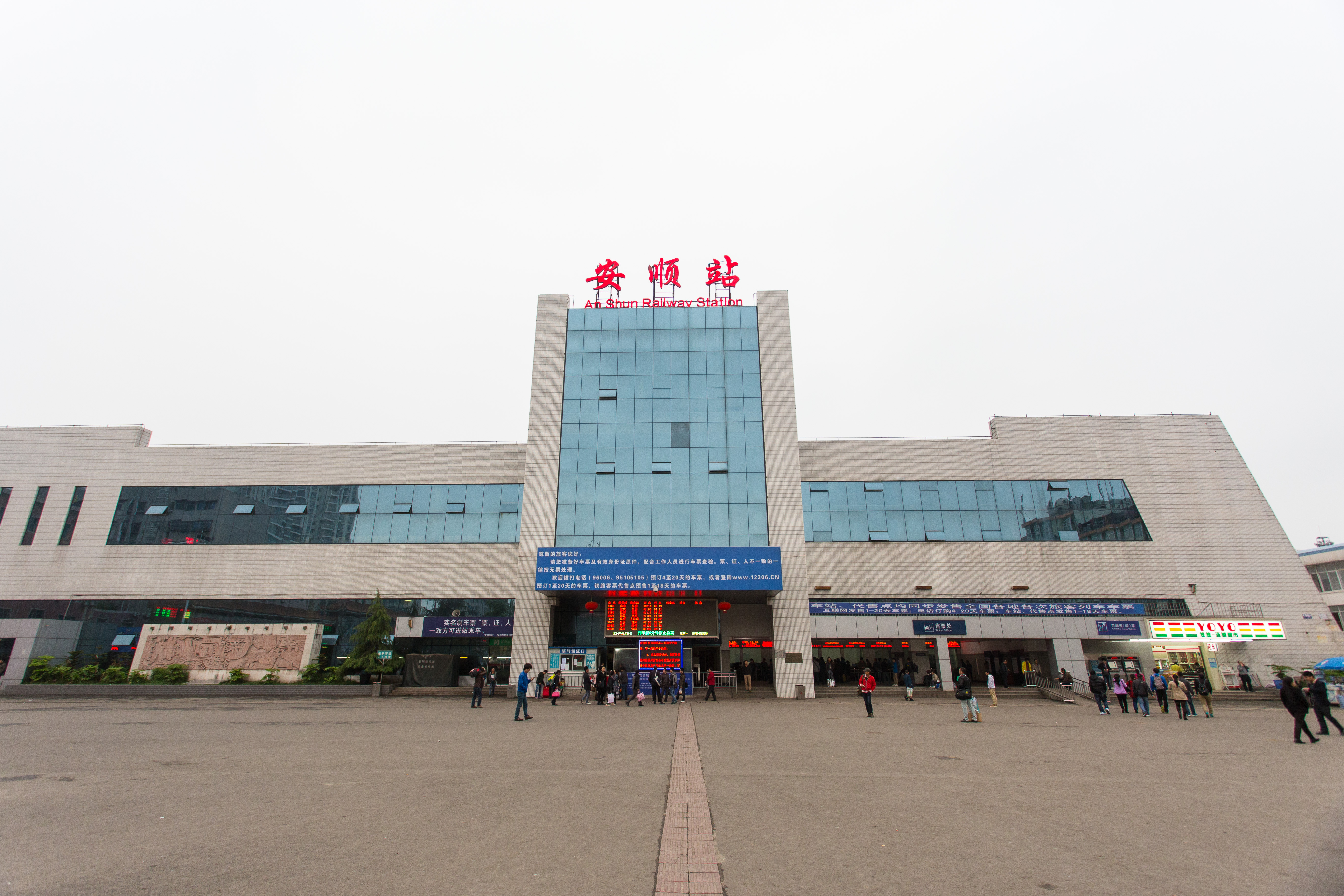 安顺火车站